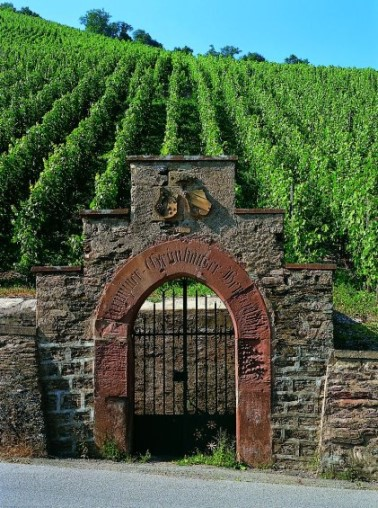 Maximiner Gruenhaeuser Herrenberg